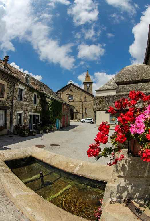 le vieux village place de la fontaine